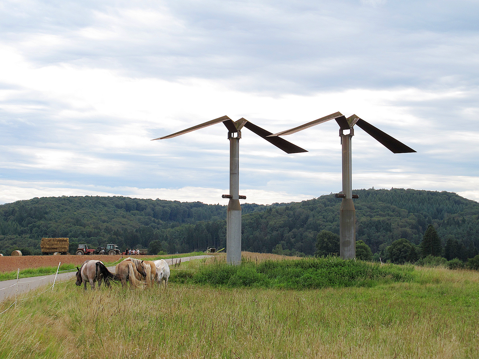 Gereon Lepper, Balzgeflüster, 1996, - Deutschland, Rheinland-Pfalz, Skulpturenweg Trippstadt-Stelzenberg